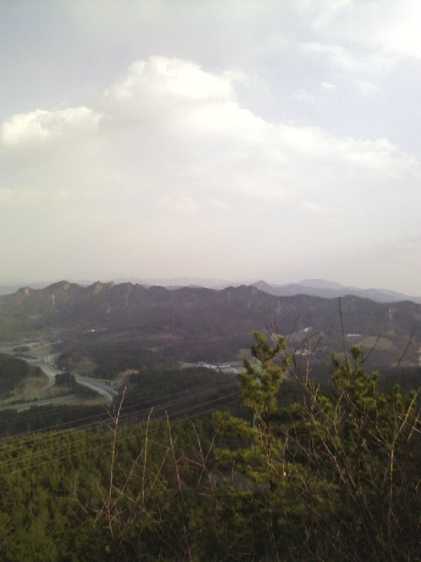 Gubongsan(Daejeon)